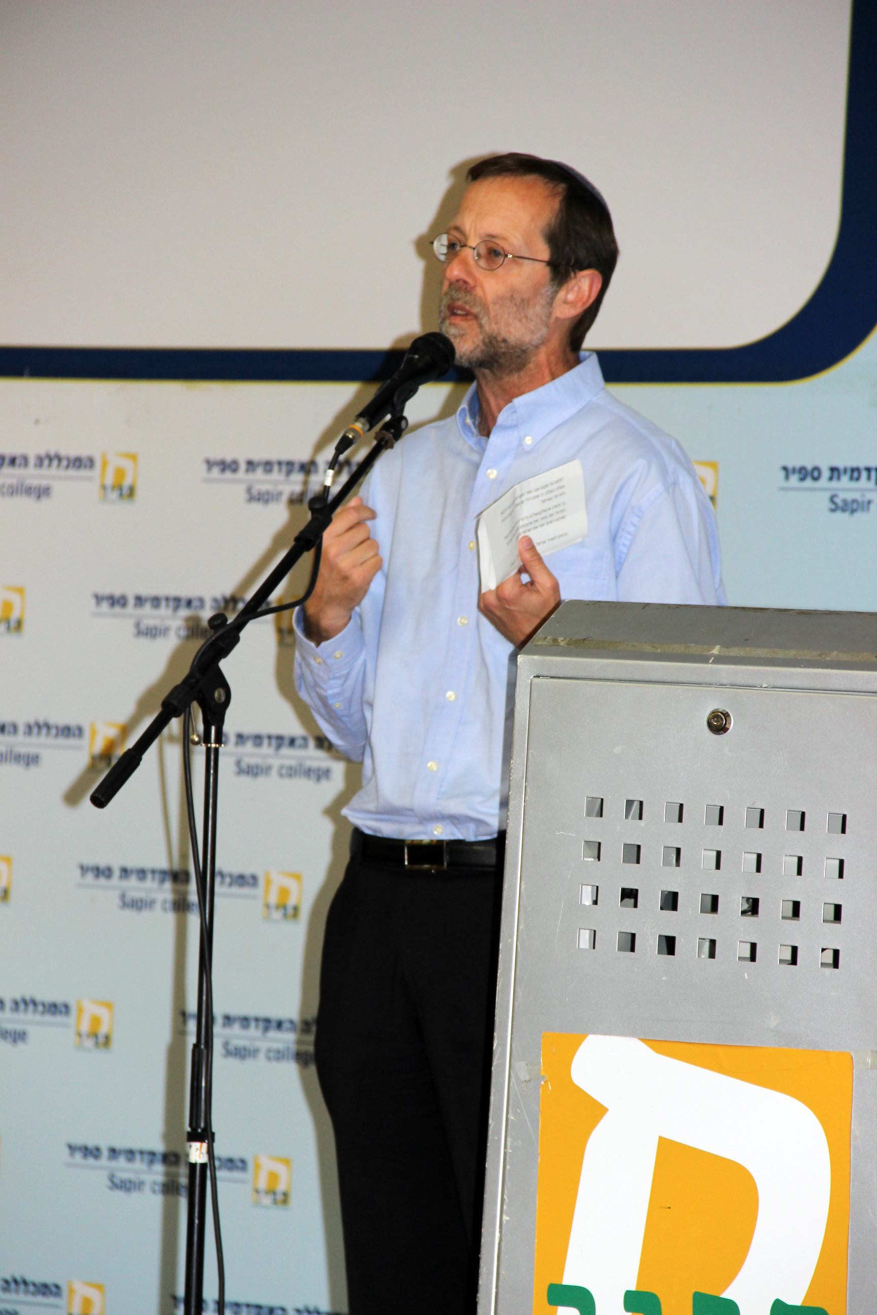 כנס שדרות לחברה במכללה האקדמית ספיר ובעיר שדרות 2015